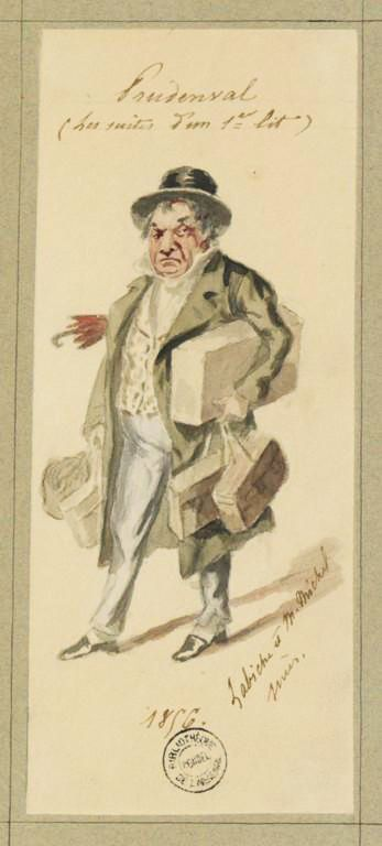 Le personnage de M.Prudenval de la pièce de Labiche Les Suites d'un premier lit, vu par Lhéritier